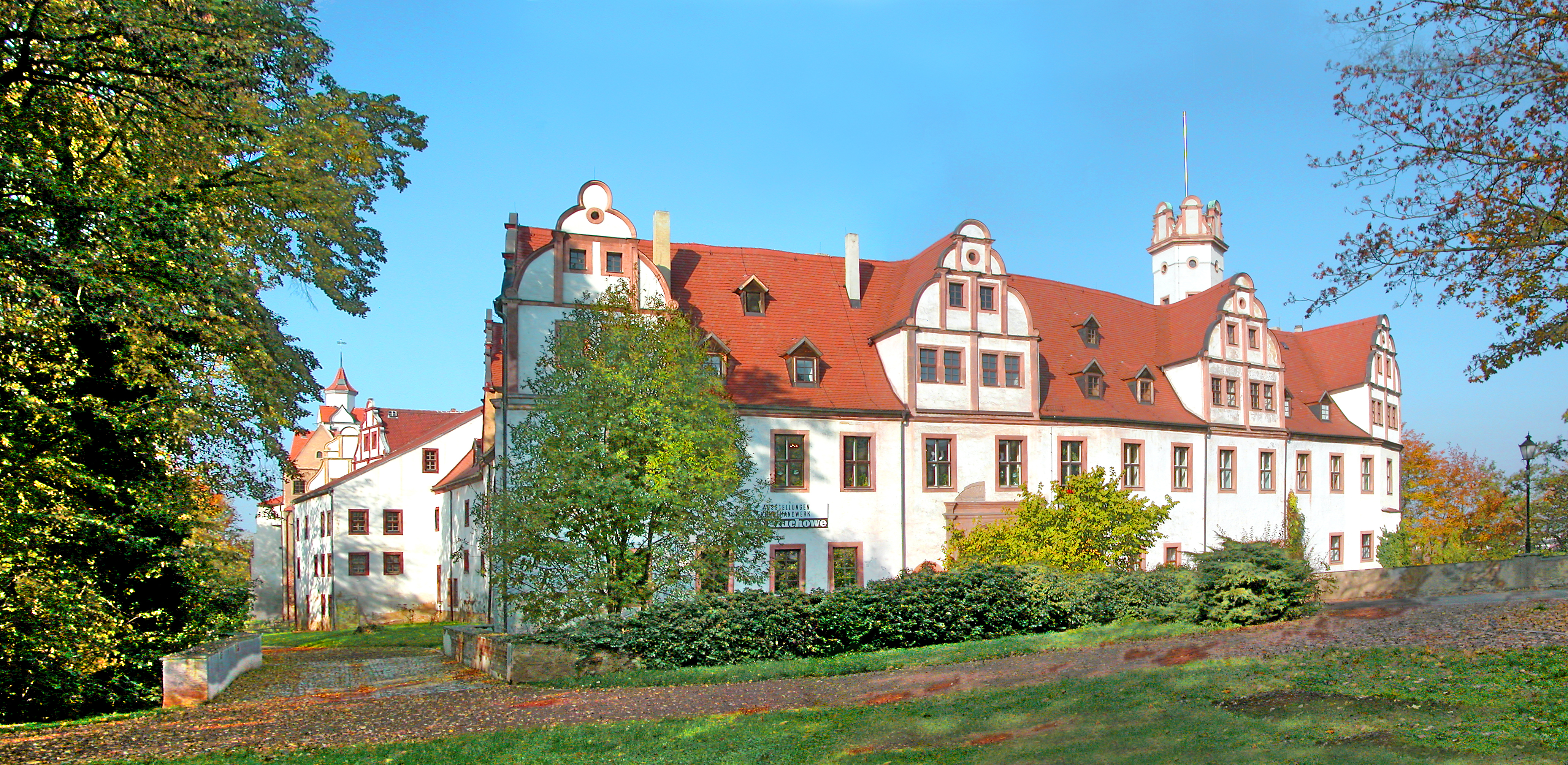 16.10.2007 08371 Glauchau, Schloßstraße 1: Schloßanlage Forderglauchau / Hinterglauchau. Eingangsfassade Forderglauchau von Südosten. [DSCN30748-30749.TIF]20071016300MDR.JPG(c)Blobelt